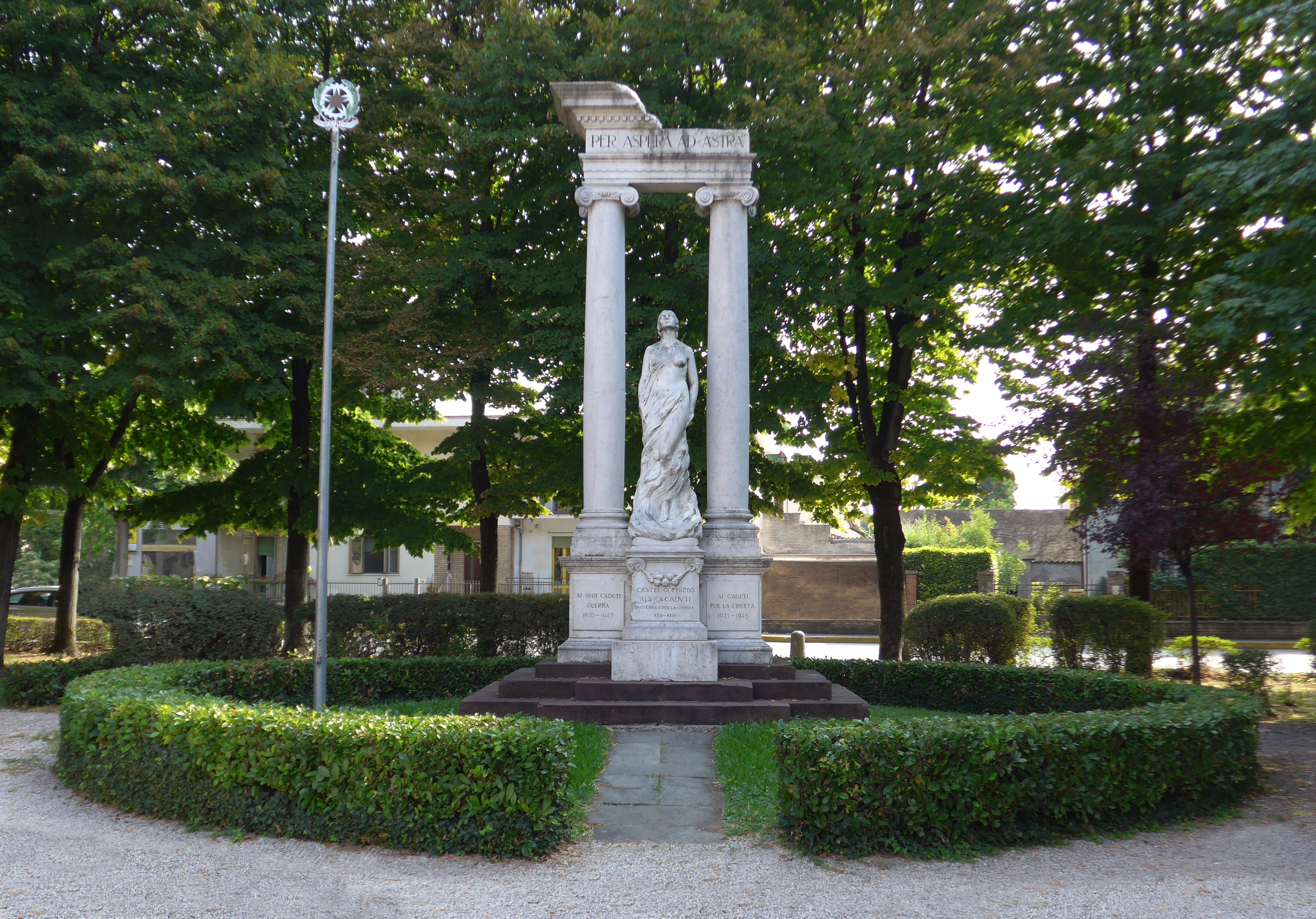 monumento ai caduti This is a photo of a monument which is part of cultural heritage of Italy.